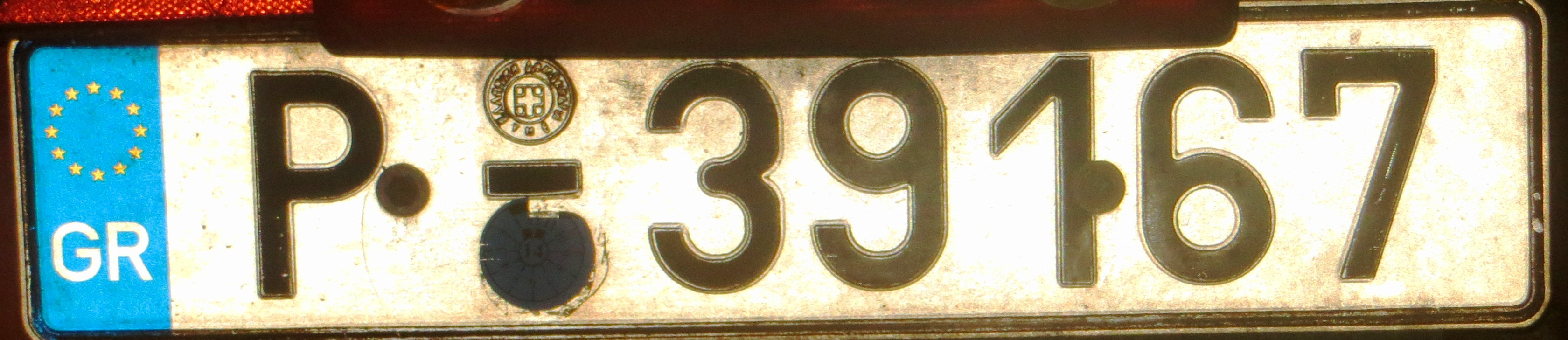 Trailer kentekenplaat Griekenland